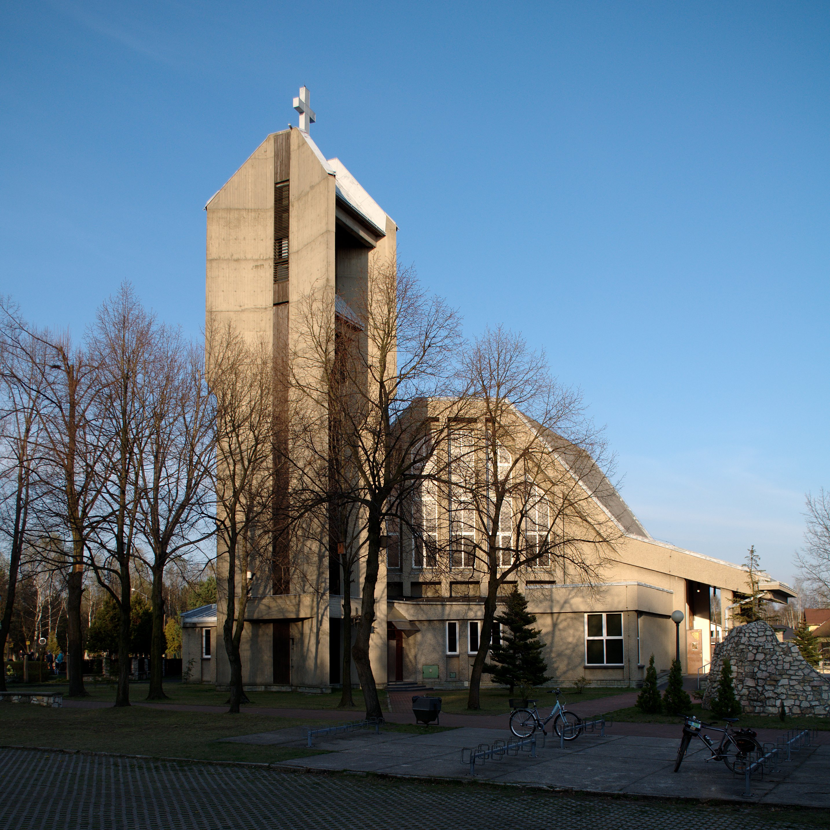 Tarnowskie Góry.